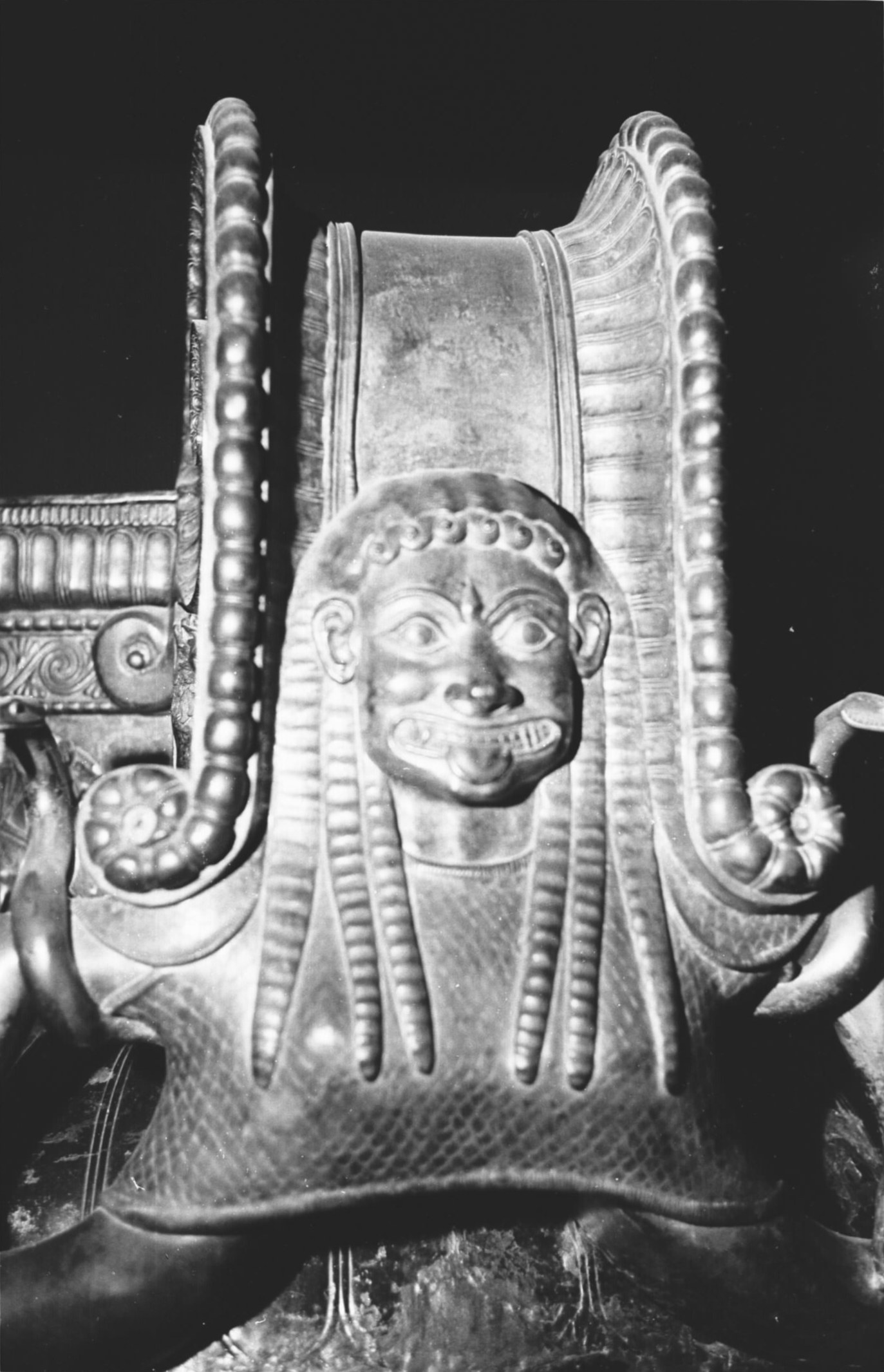 Photographie du cratère de Vix, un vase de bronze, du type cratère, découvert en 1953 dans la tombe d'une princesse celte à Vix (Côte-d'Or) datée vers 510 av. J.-C. Les cratères étaient, dans l'antiquité, destinés à opérer un mélange entre le vin, imbuvable seul, l'eau, et sans doute divers aromates. C'est un objet exceptionnel de par sa taille (1,24 m) et sa facture. Il est constitué de l'assemblage de plusieurs pièces séparées, l'ensemble pèse 208,6 kg. Le vase est fait d'une seule pièce en feuille de bronze martelée et pèse environ 60 kg. Son fond est arrondi, son diamètre maximal est de 1,27 m. et sa capacité est de 1100 litres; l'épaisseur moyenne de la paroi varie entre 1 et 1,3 mm, et l'on n'arrive pas à déceler de soudure. Le pied est une pièce coulée d'un diamètre à la base de 74 cm et pèse 20,2 kg. Il est décoré de motifs classiques de végétaux stylisés. Les anses, fonte de bronze d'un poids de 46 kg chacune. En forme de volutes d'une hauteur de 55 cm, elles sont richement décorées de gorgones grimaçantes et tirant la langue. La frise des hoplites décore le tour du col. Huit quadriges conduit par un aurige de plus petite taille, suivant la règle d' isocéphalie nécessitée par la composition, sont suivit chacun par un hoplite à pieds en armes. Cette frise est un chef-d'œuvre du bas-relief grec. Le couvercle, feuille de bronze martelée de 13,8 kg, couvrait l'ouverture du cratère, et en son centre, s'élève une statuette en bronze de 19 cm de haut, représentant une femme. Le cratère et la totalité des pièces retrouvées dans la sépulture de la tombe princière de Vix se trouvent aujourd'hui exposés au Musée du Châtillonnais, à Châtillon-sur-Seine.